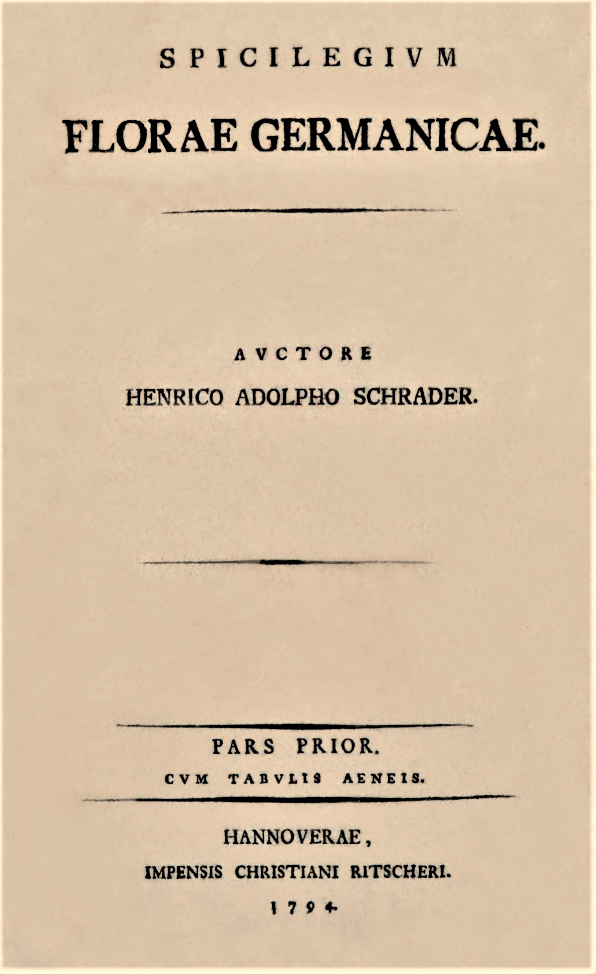 Henrico Adolpho Schrader (=Heinrich Adolph Schrader): „Spicilegium florae germanicae, vol. 1, Verlag Christian Ritscher, Hannover 1794, Titelseite